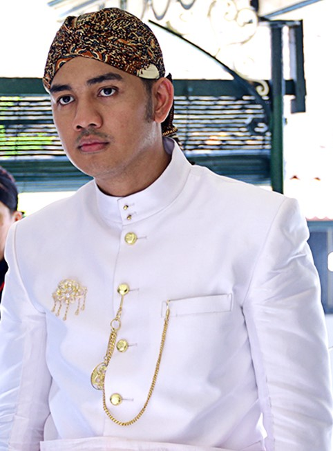 Kanjeng Pangeran Haryo Yudhonegoro